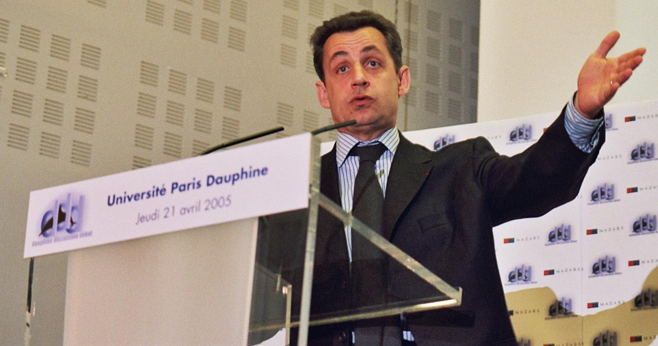 Nicolas Sakozy à l'Université Paris-Dauphine devant 1,000 étudiants